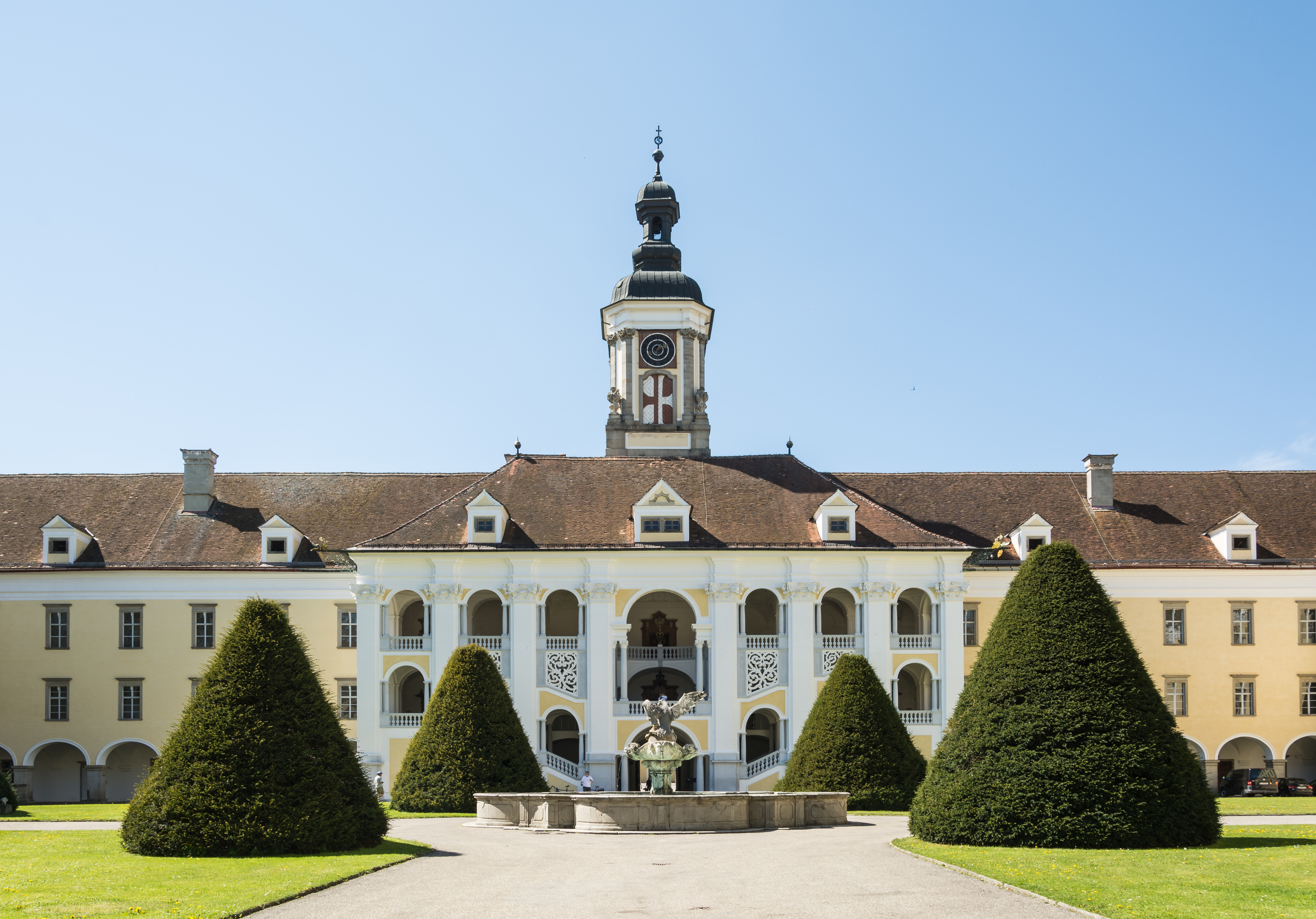 Das Treppenhaus des Augustinerchorherrenkloster in St. Florian wurde schon von Carlo Antonio Carlone in der Gesamtanlagenplanung mit offenen Arkaden vorgesehen und zwischen 1706 und 1714 von Jakob Prandtauer und Giovanni B. Bianco mit verschiedenen Änderungen ausgeführt. Im Mittelrisalit des großen Stiftshofes sind die einläufigen Treppenpaare in zwei Geschossen angeordnet. Die Treppen sind an die Gänge des Westflügels angeschlossen. Die Arkaden im Untergeschoss steigen mit den Treppen an, im Obergeschoss verlaufen sie waagrecht. Die Geschosse sind durch Kolossalpilaster zusammengefasst. Über der Durchfahrt ist eine große Mittelarkade angeordnet von deren Treppenabsatz sich der ganze Hof überblicken lässt.